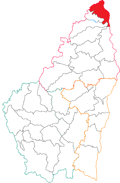 Situation du canton dans le département de l'Ardèche (France)